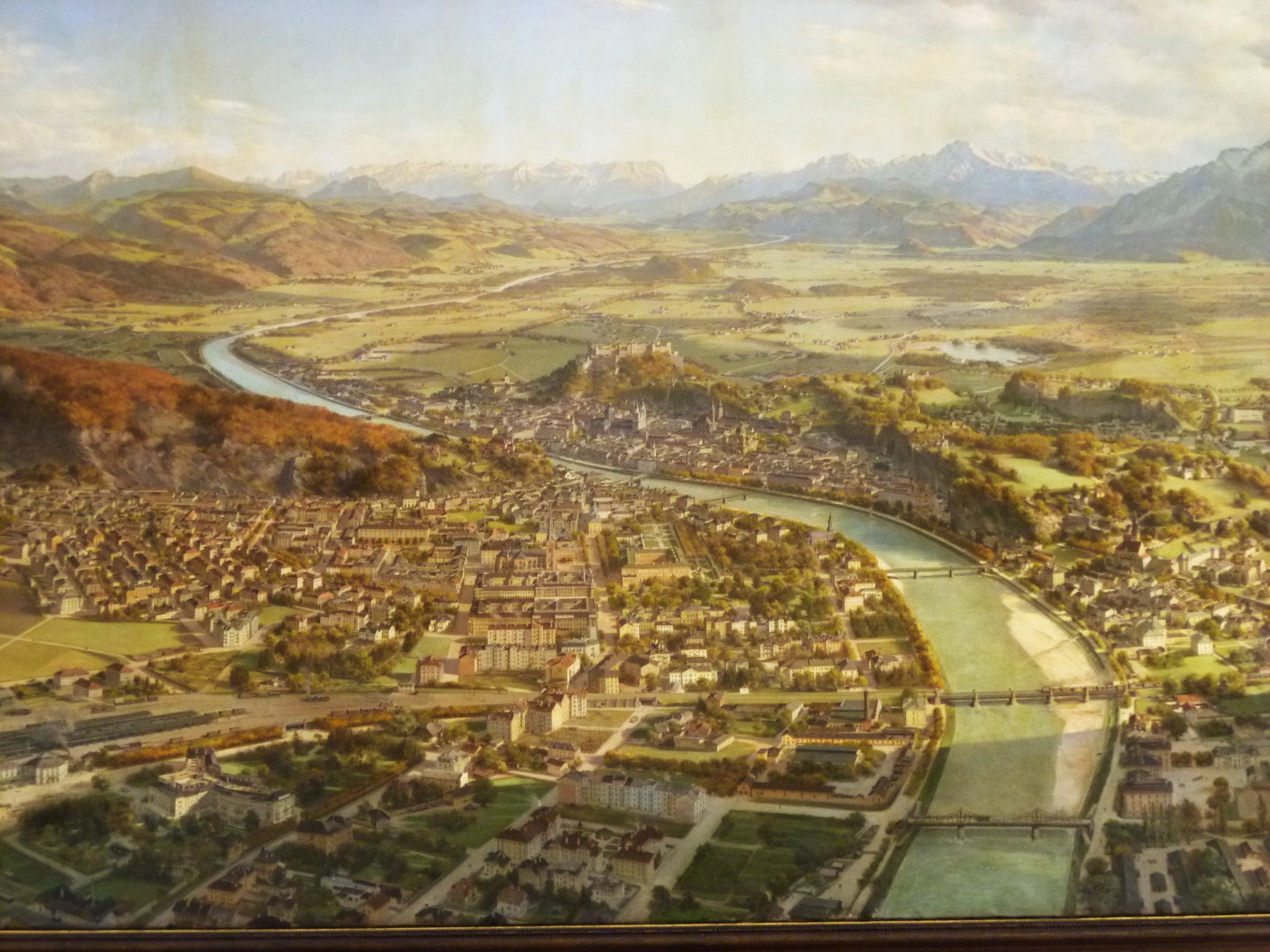 Die Stadt Salzburg im Jahre 1916. Auf konstruktivem Weg aus verschiedenen Teilbildern zusammengesetztes Gemälde.